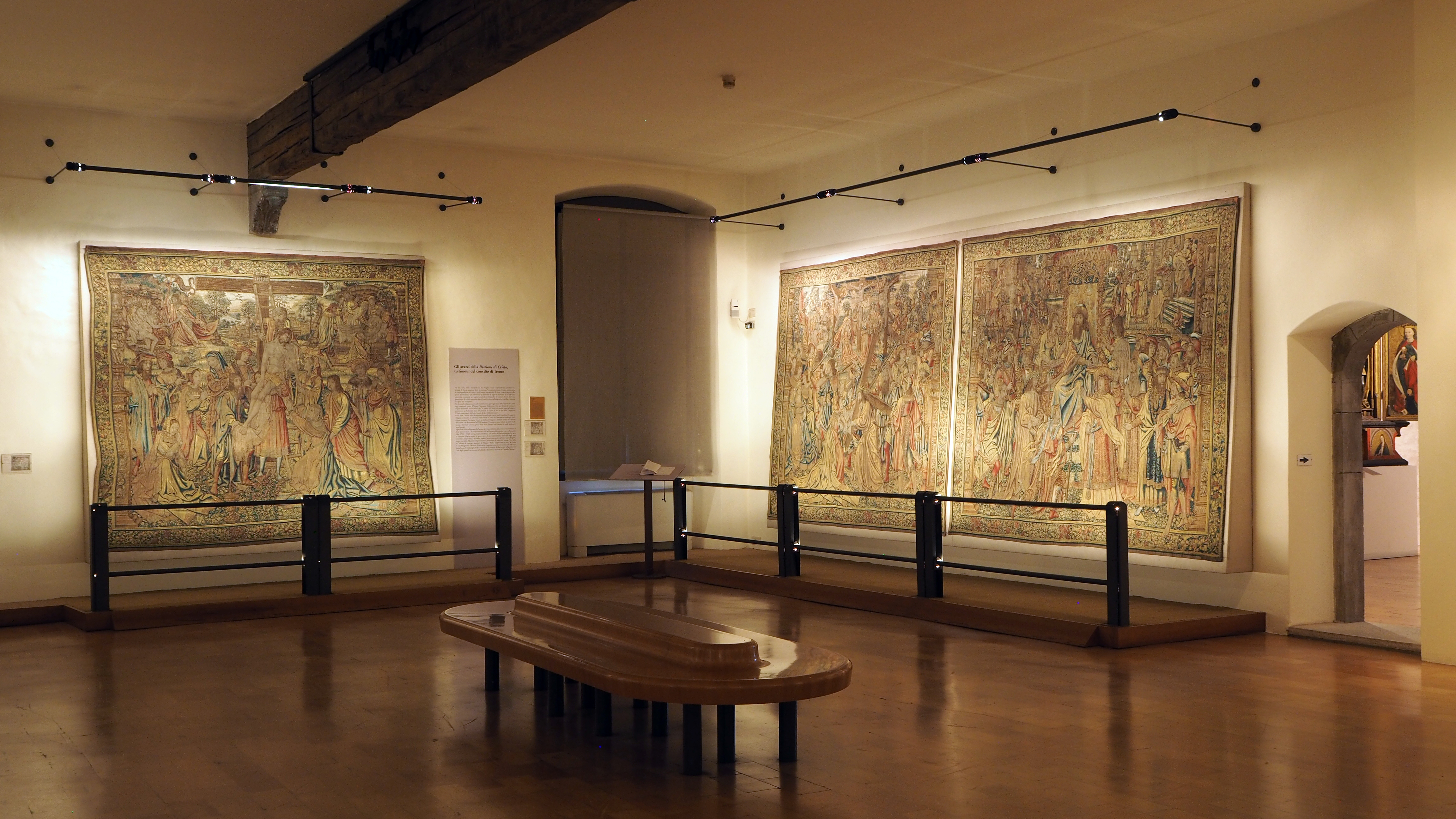 La sala degli arazzi all'interno del Museo Diocesano Tridentino.